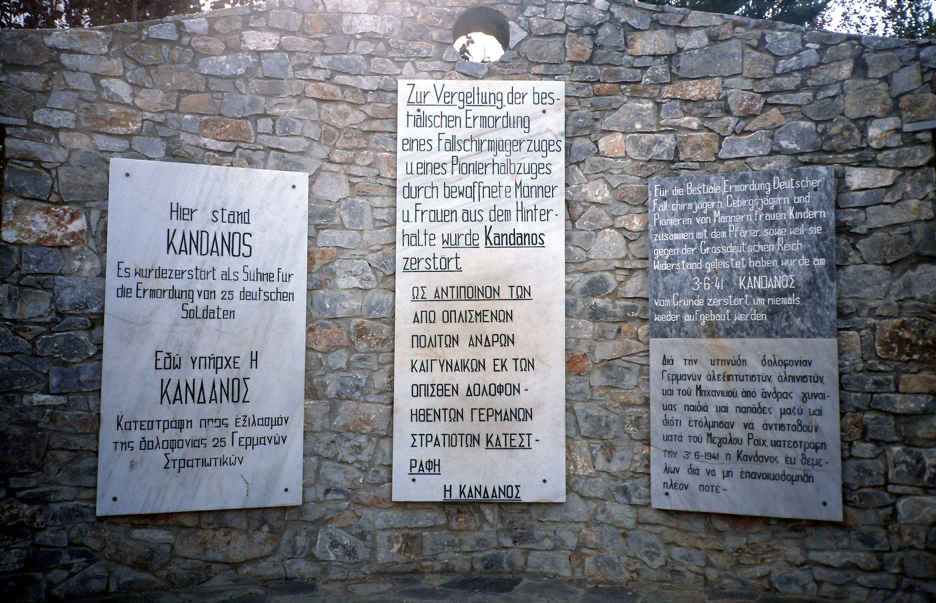 Mahnmal in Kandanos Sonstiges: ...